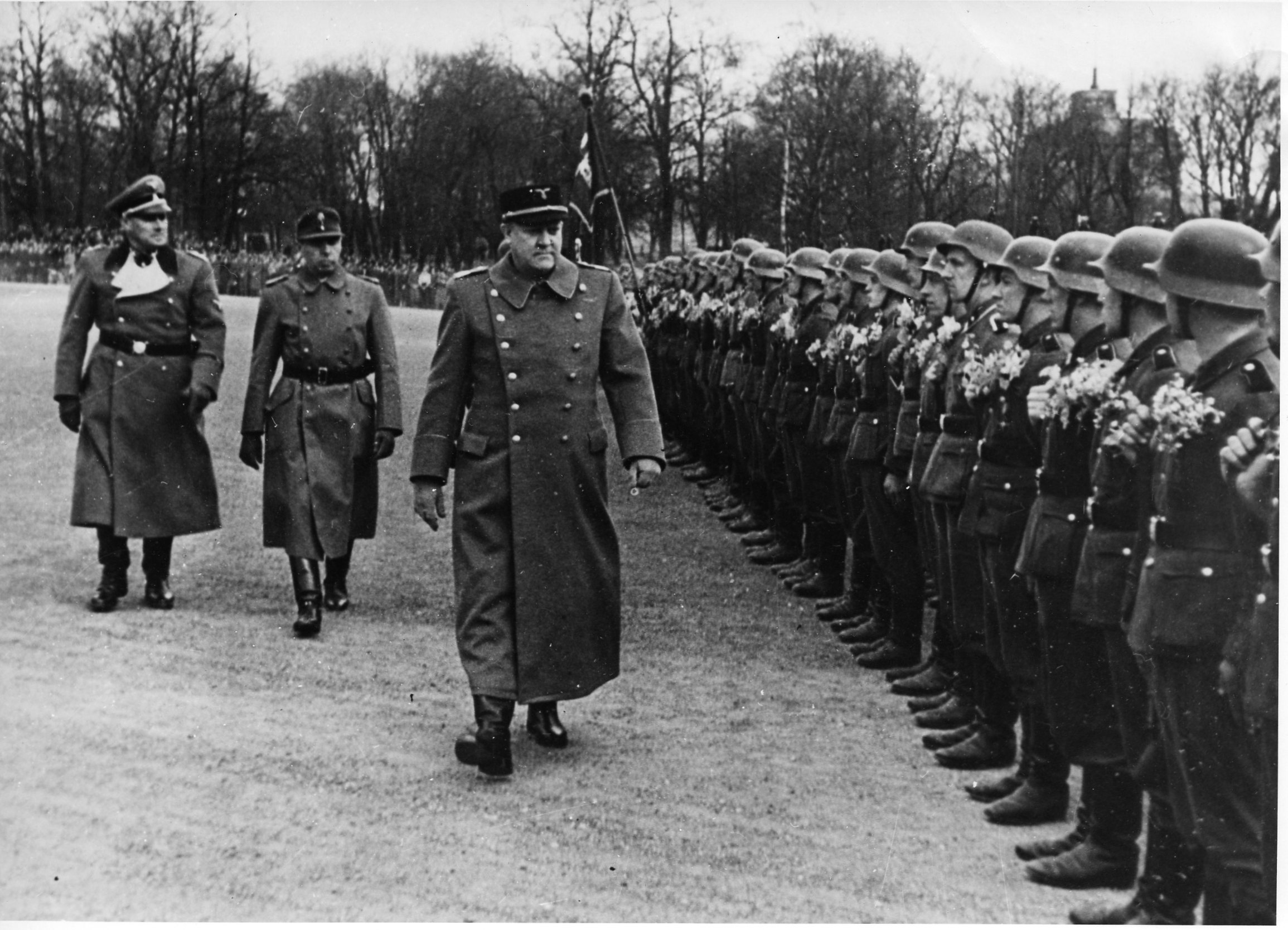 Motivet samsvarer med filmopptak i Filmavisen no. 54 (19. april) 1943 : «1. Mønstring av hjemvendte frontkjempere»: «Det første politikompaniet er kommet heim og sammen med det en stor skarve permitterte soldater fra Den norske legion. Frontkjemperne fikk en verdig og begeistret mottakelse i Oslo. Først stilte frontkjemperne opp til mønstring på Festningsplassen. En rekke høgre norske og tyske militære var til stede. Avdelinger av Småhirden og Gjentehirden overrakte hver enkelt en vakker bukett av vårens blomster og lauv. Paraden og defileringen foran Føreren foran Slottet ble en kort, men stemningsfull høytidelighet. Blant de frammøtte personligheter såes en rekke representanter for stat og parti med samtlige ministre i spissen. Avdelingene stod oppstilt med front mot Slottet da Føreren kom ut på plassen. Føreren holdt så en tale og takket frontkjemperne for hva de hadde gjort for Norge. Deretter defilerte avdelingene for Føreren.» I følge et liknende foto i Aftenposten onsdag 7. april 1943 viser bildet ministerpresident Vidkun Quisling som inspiserer hjemvendte frontkjempere på Slottsplassen om ettermiddagen tirsdag 6. april 1943. (Feilaktig beskrivelse i Flickr: Dette bildet er tatt da politikompaniet av Den Norske Legion paraderte for Quisling før avreisen til østfronten i 1942. Paraden er, som en ser, henlagt til Slottsplassen. Edsavleggelsen foregikk på tysk for den tyske politigeneralen ved leiren i Holmestrand. Bildet viser Jonas Lie gjøre honnør for Quisling. 1942/10/01.) RA/PA-1209/Ue 97/ (img107)